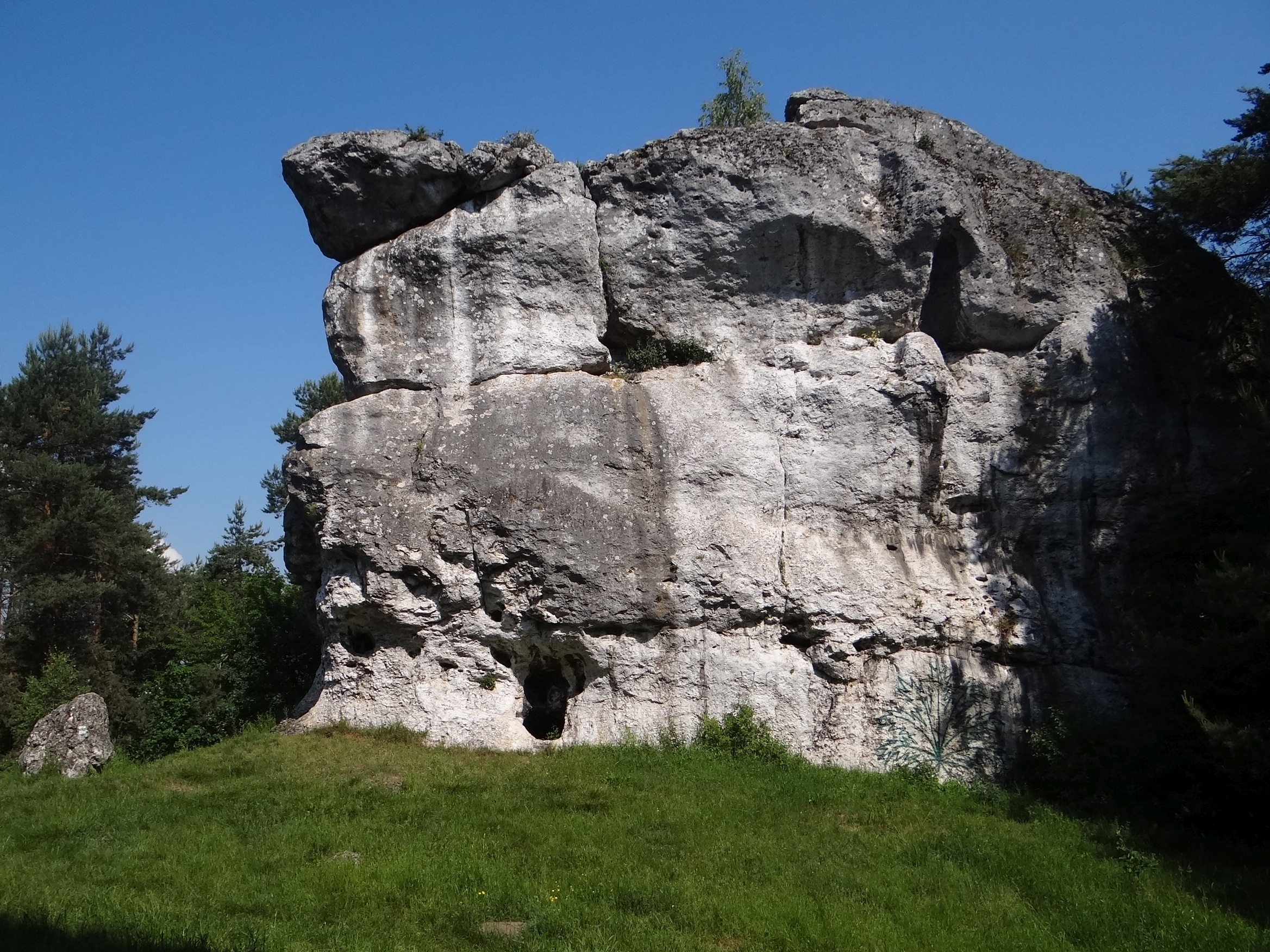 Skała na wzgórzu Słupsko w Kostkowicach